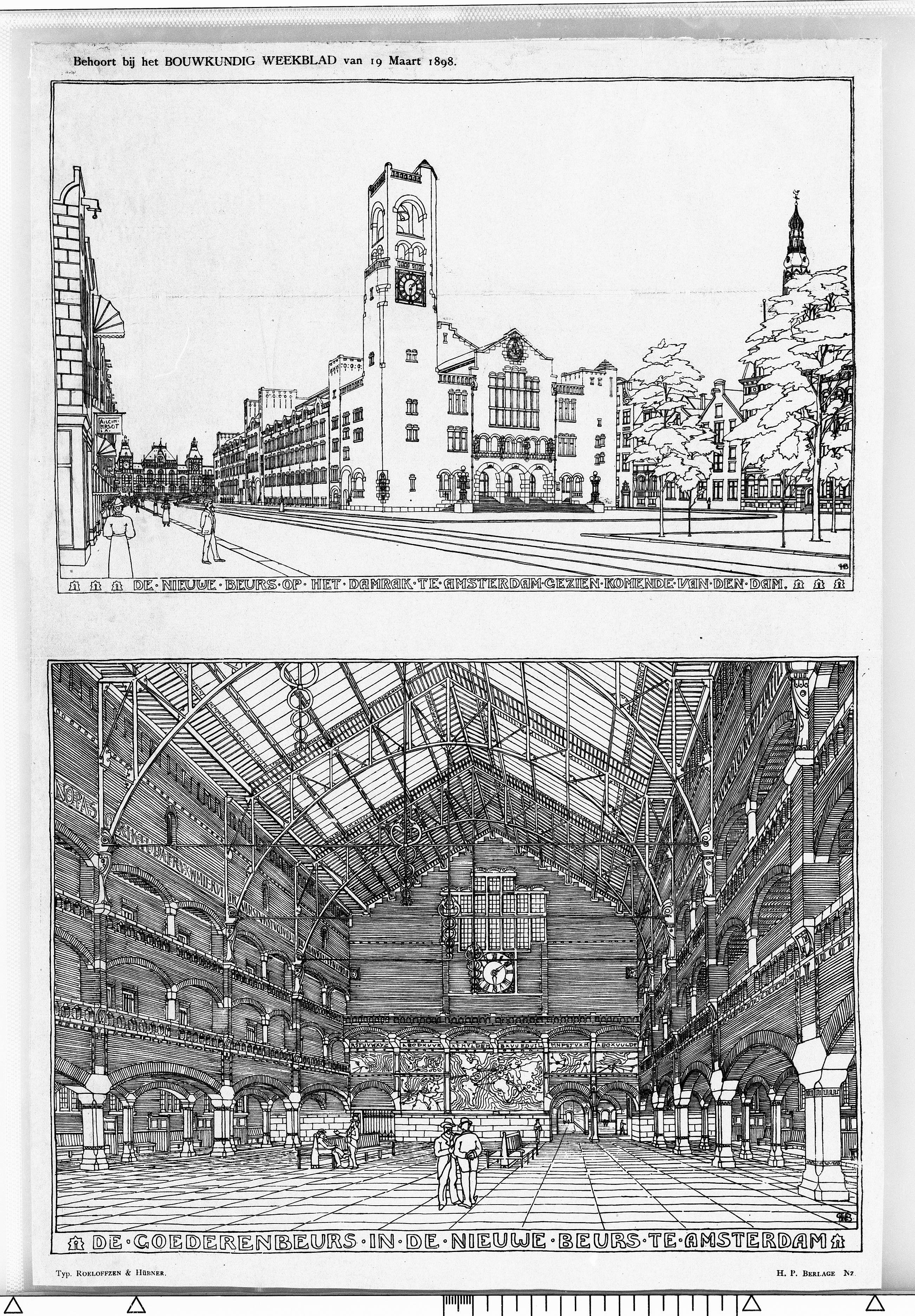 Beschrijving Beurs van Berlage perspectivische schets en interieur Documenttype bouwtekening Vervaardiger Berlage, H. P. (Hendrik Petrus, 1856-1934) Collectie Collectie Stadsarchief Amsterdam: bouwtekeningen Datering 1898 Geografische naam Damrak Inventarissen Afbeeldingsbestand 010056915032